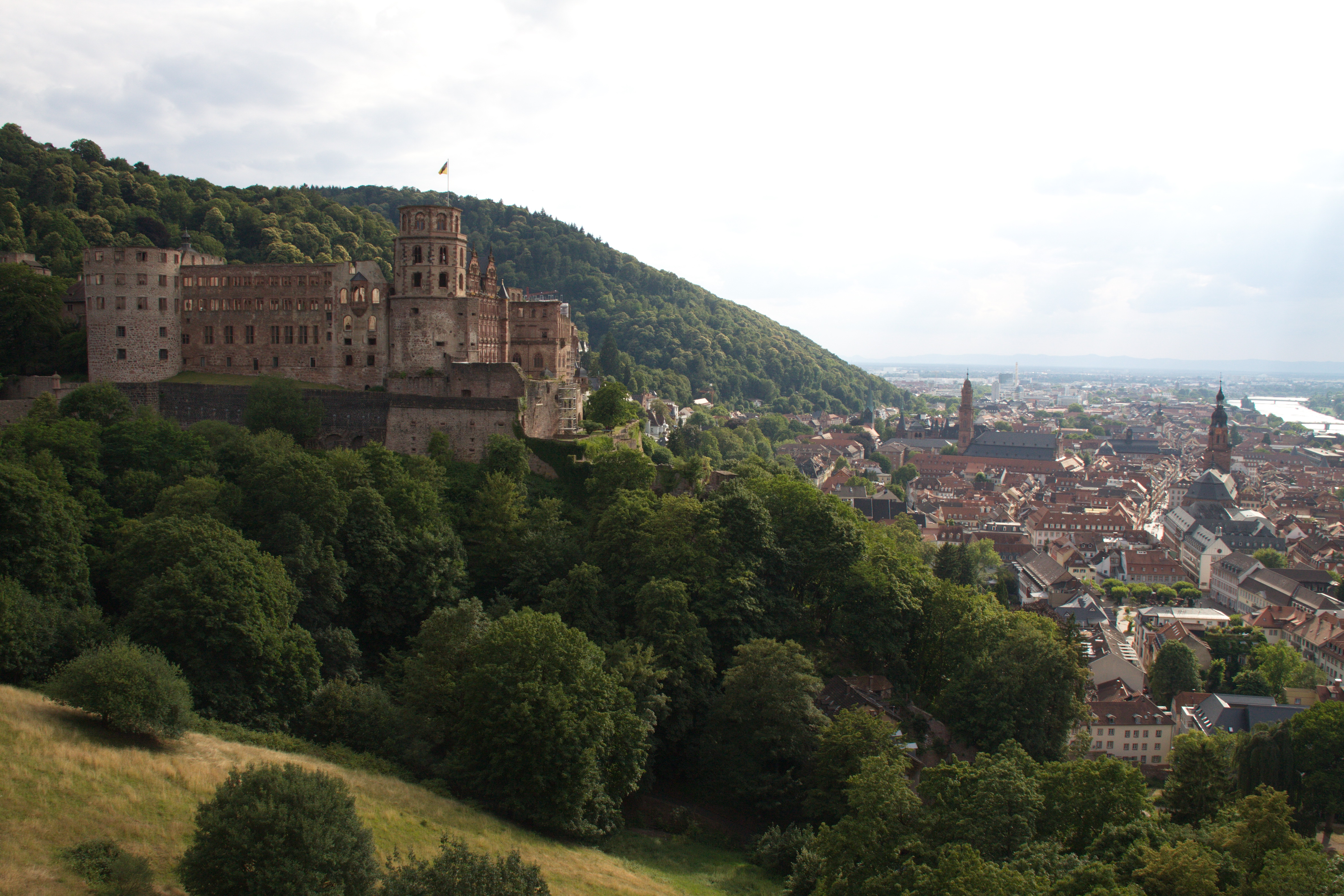 Schloss D-69117 Heidelberg in der Abendsonne mit Blick auf die Altstadt in östliche Richtung.